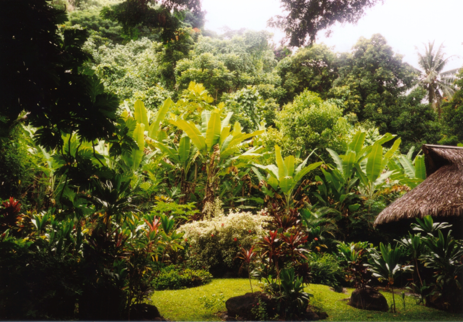 Traditionelles Haus mit Garten auf Tahiti, Französisch-Polynesien. Dahinter erhebt sich der Bergregenwald